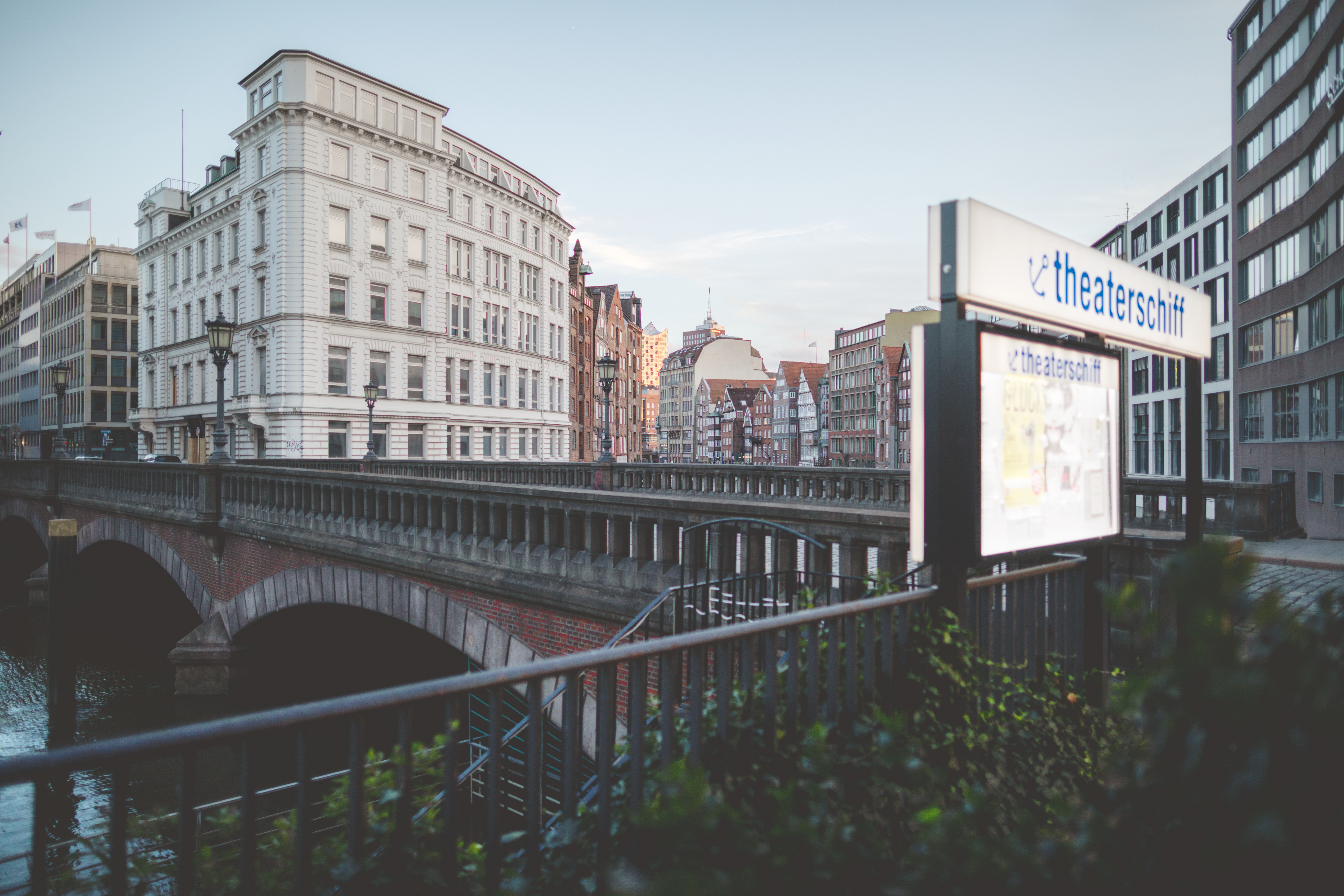 Theaterschiff Hamburg Copyright: Heribert Schindler / Theaterschiff Hamburg